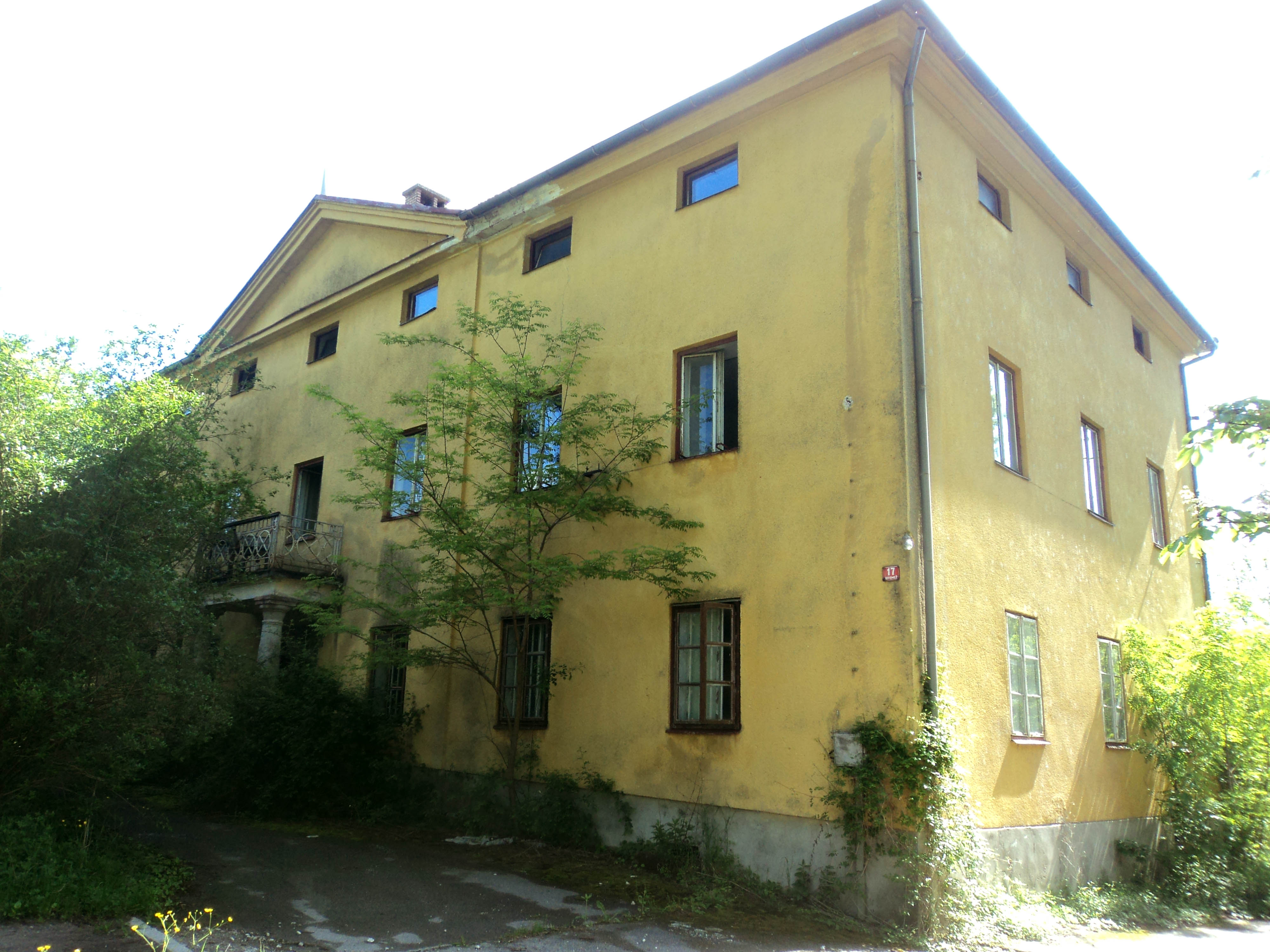 Dvorec Hotemež 2011